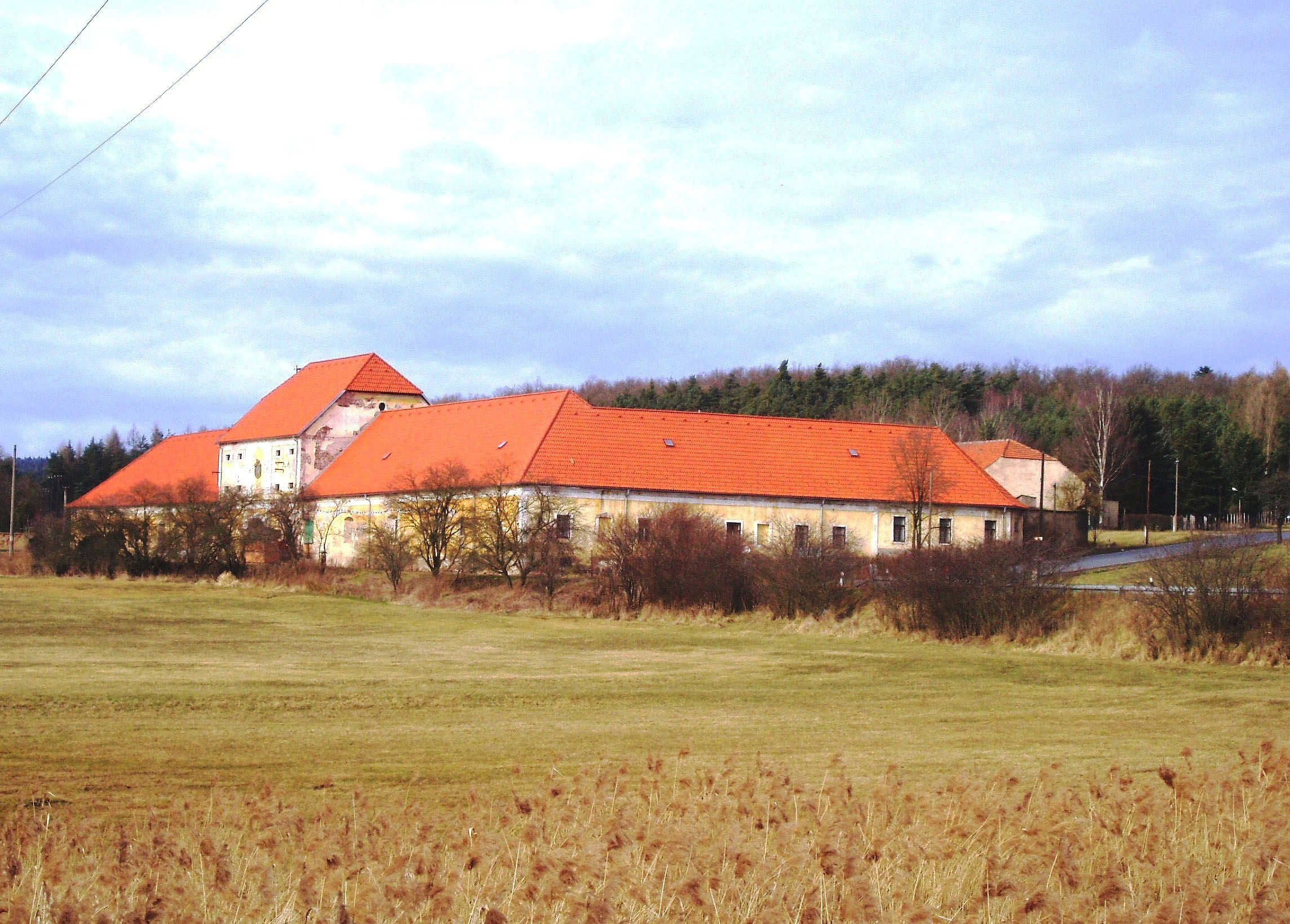 Trnová u Dobříše - hospodářský dvůr